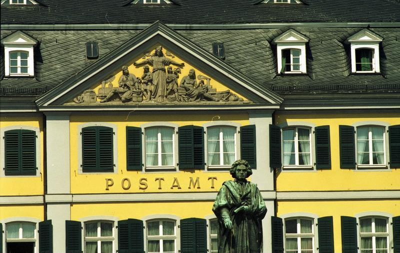 29.7.1991 Szenen in der Bonner Innenstadt (Fußgängerzone) während des Sommer-Schluß-Verkaufs